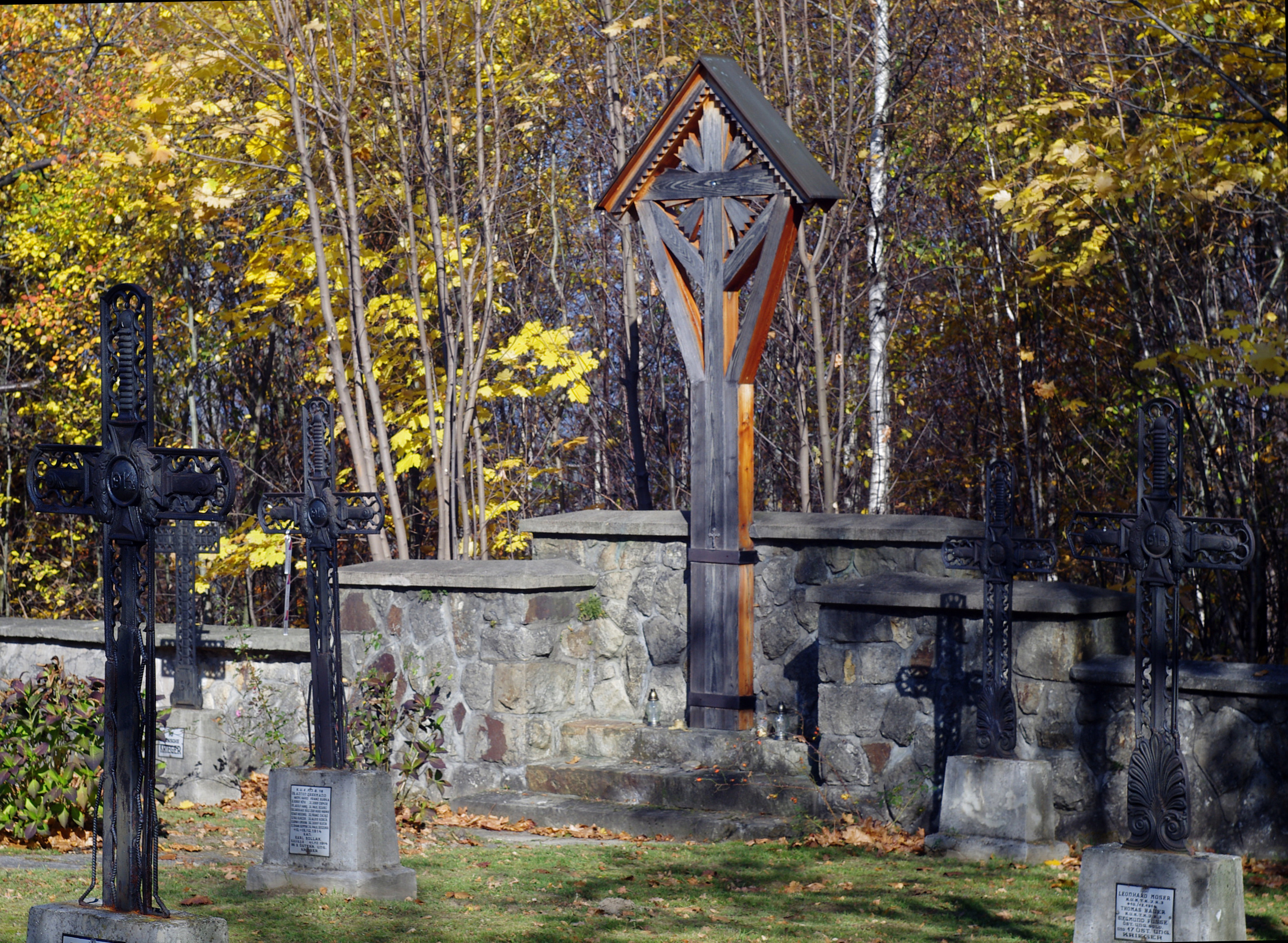 Cmentarz wojenny nr 341 - Sobolów-Zonia